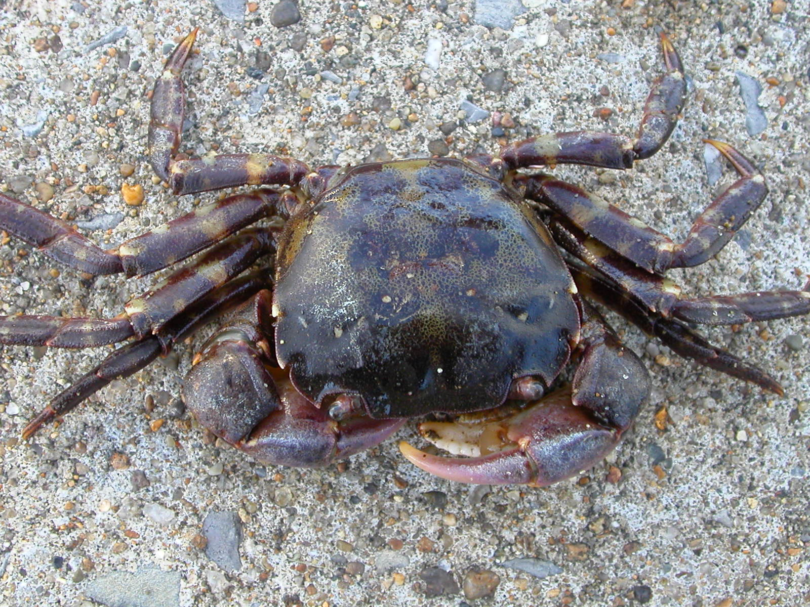 Hemigrapsus sanguineus(イソガニ)